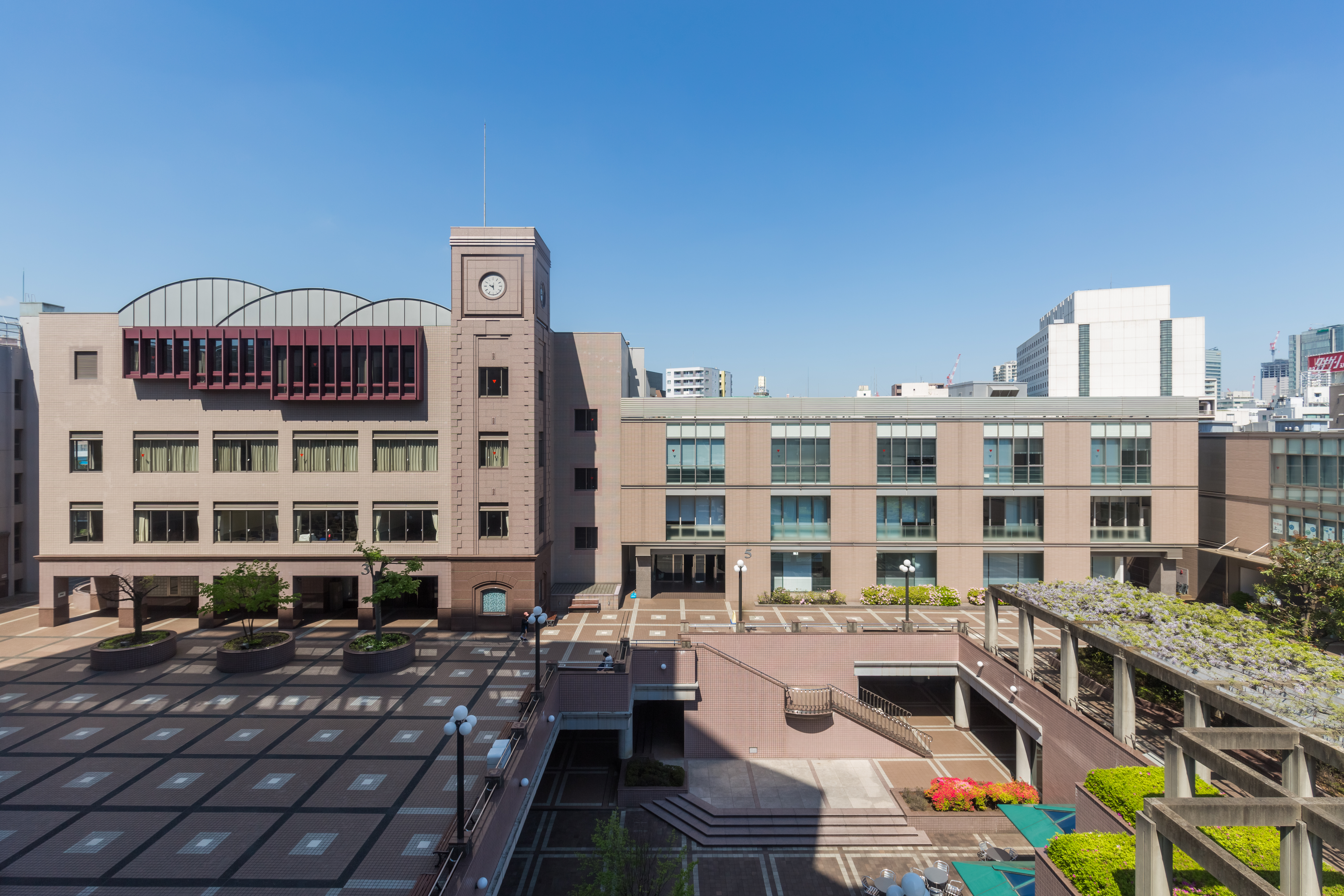 立正大学 品川キャンパス 校内